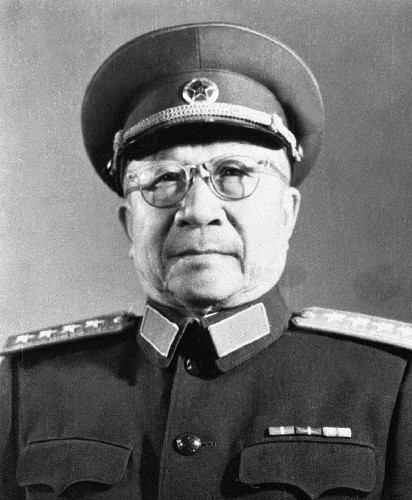 张云逸，中华人民共和国大将授勋照